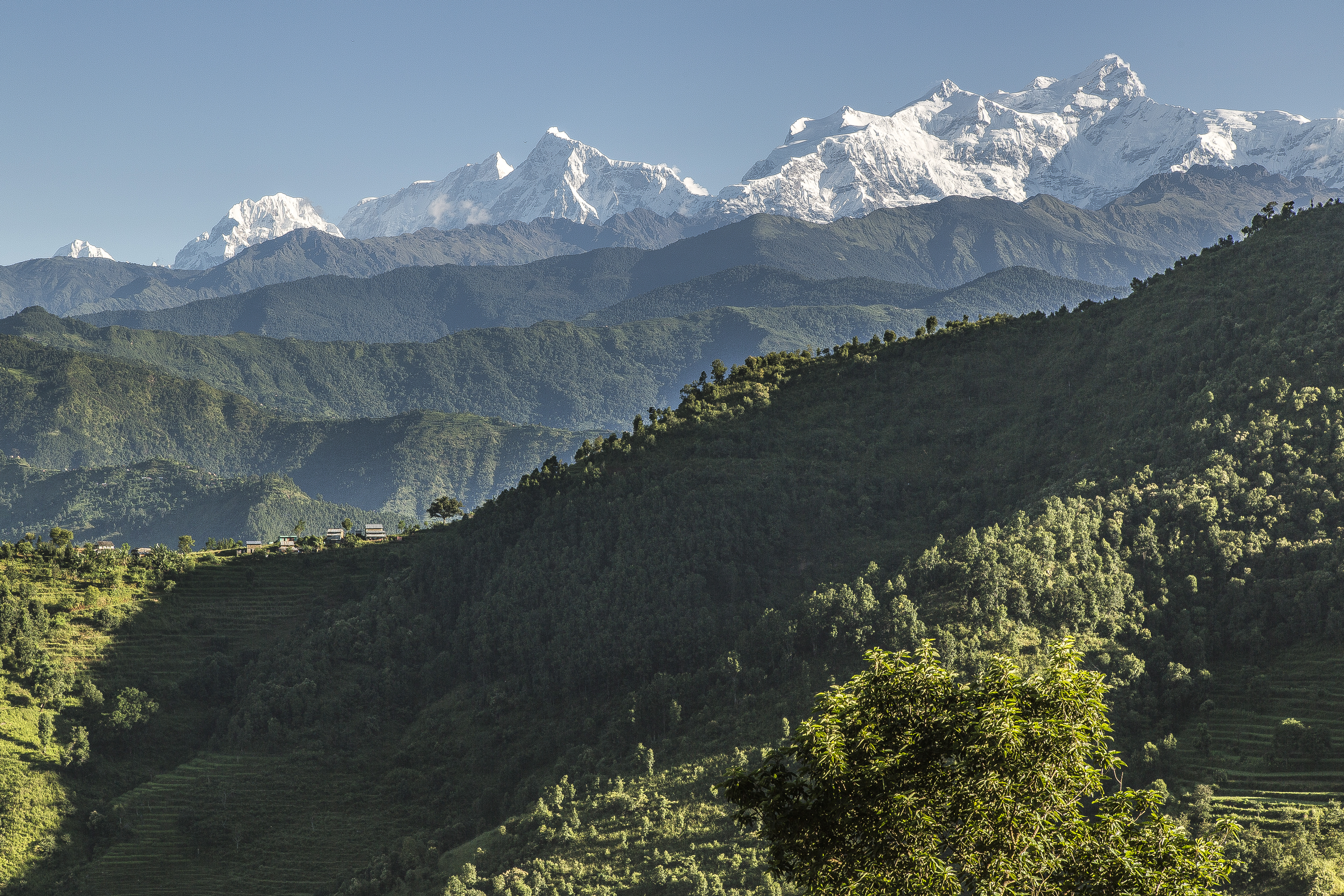 Bergketten vor dem Boudha Himal in Nepall